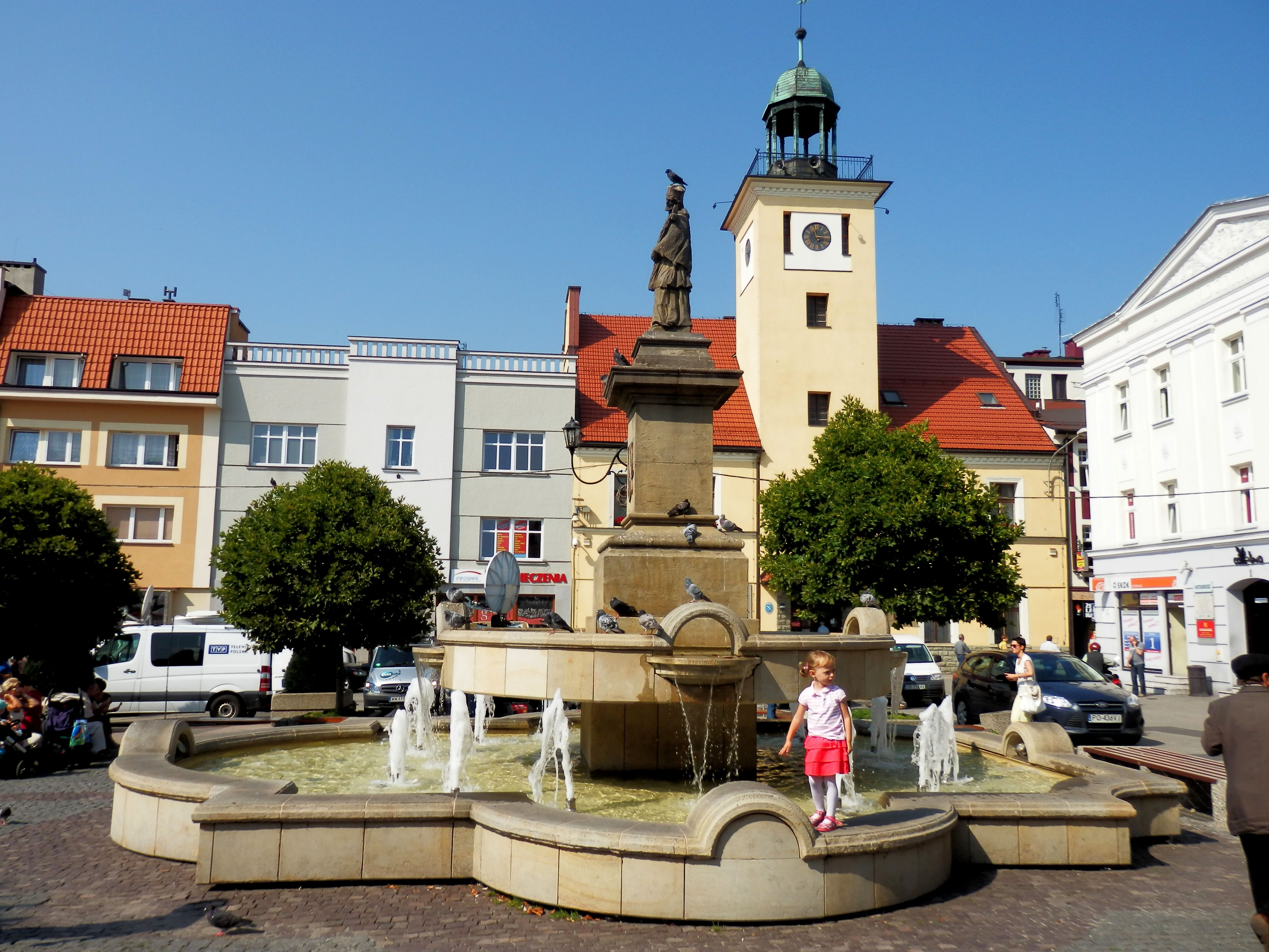 Rybnik, d. ratusz, ob. Urząd Stanu Cywilnego i Muzeum Miejskie, XVIII w.